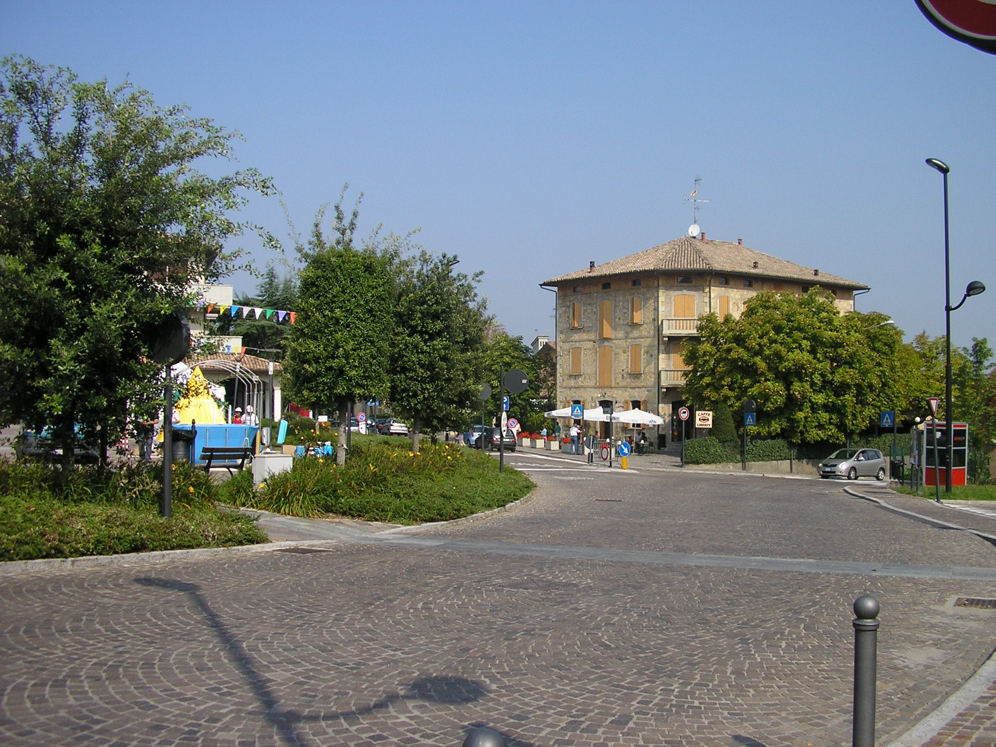 Panoramica di Piazza Cavicchioni